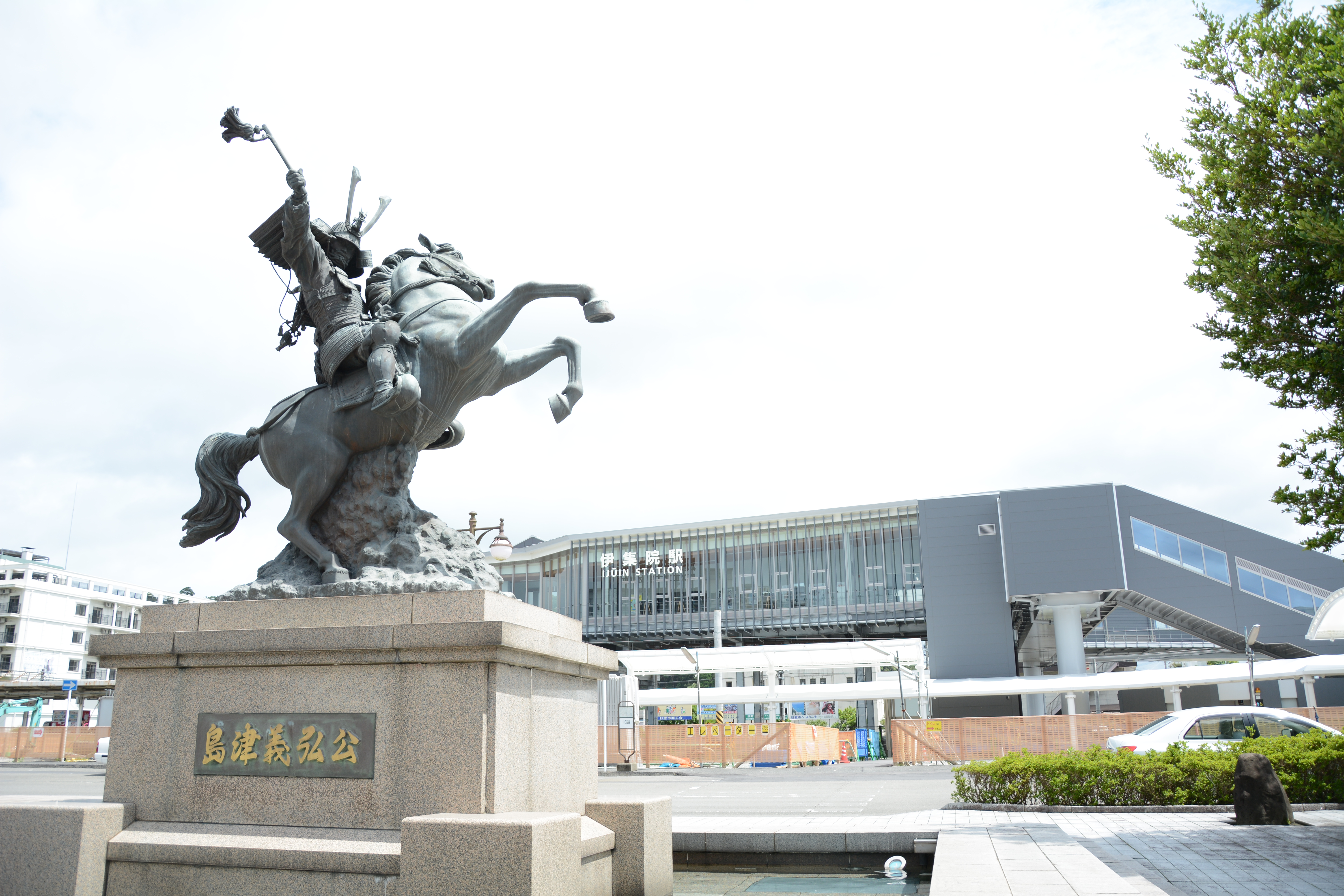 伊集院駅の風景